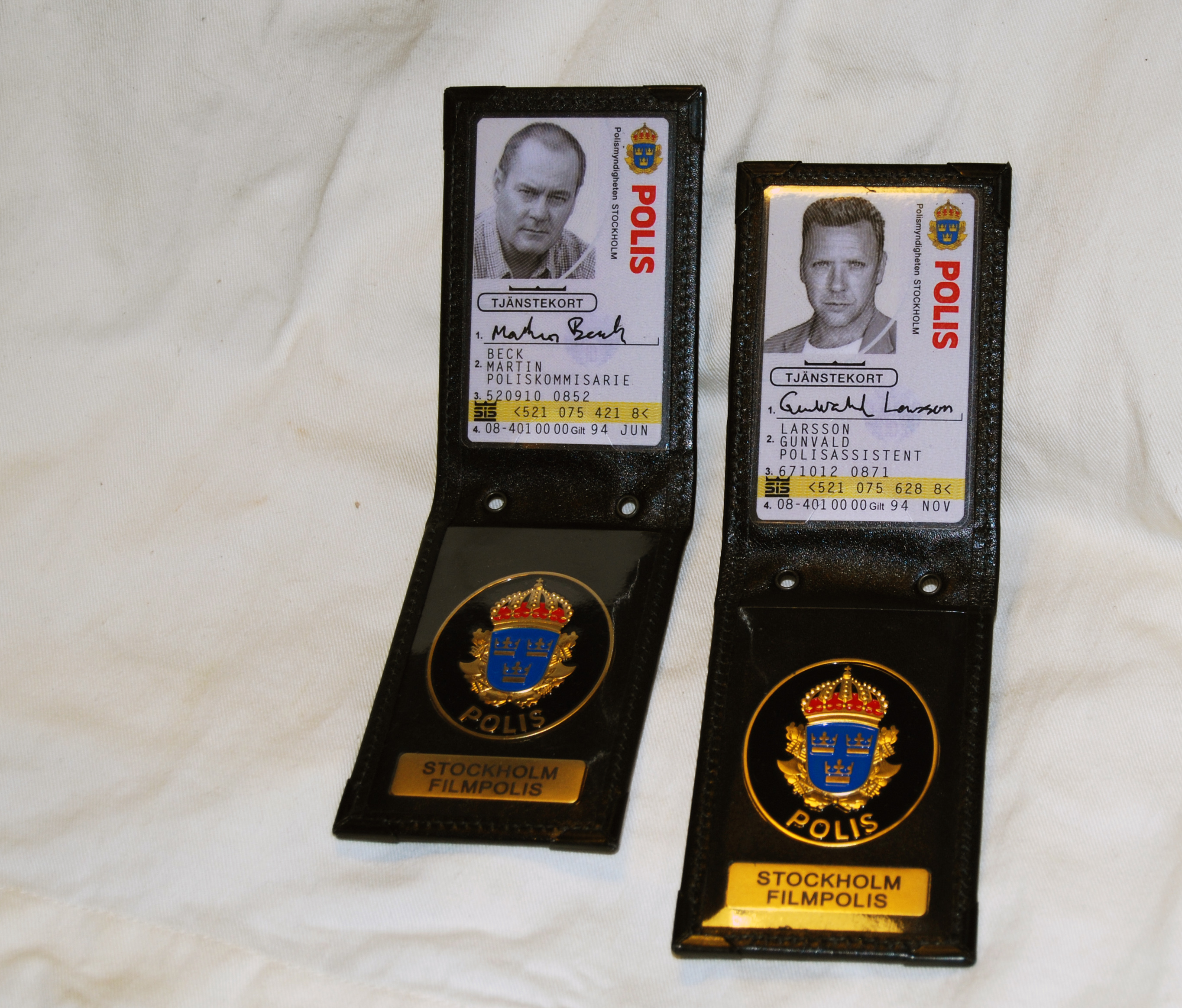 Detta är två "Movie props", de är lika dåtidens svenska polisbrickor men dessa har modifierats genom att de är försedda med två öljetter så att de kan bäras I en kedja runt halsen, samt att de har en utskärning i plasten för tjänstekortet. Detta för att man lättare ska kunna ta ut detsamma. Modifikationerna blev standard år 2014. Sökord: ID-fodral, polisbricka, tjänstetecken, Martin Beck, Gunvald Larsson, M/92, Modell 1992, tjänstekort.